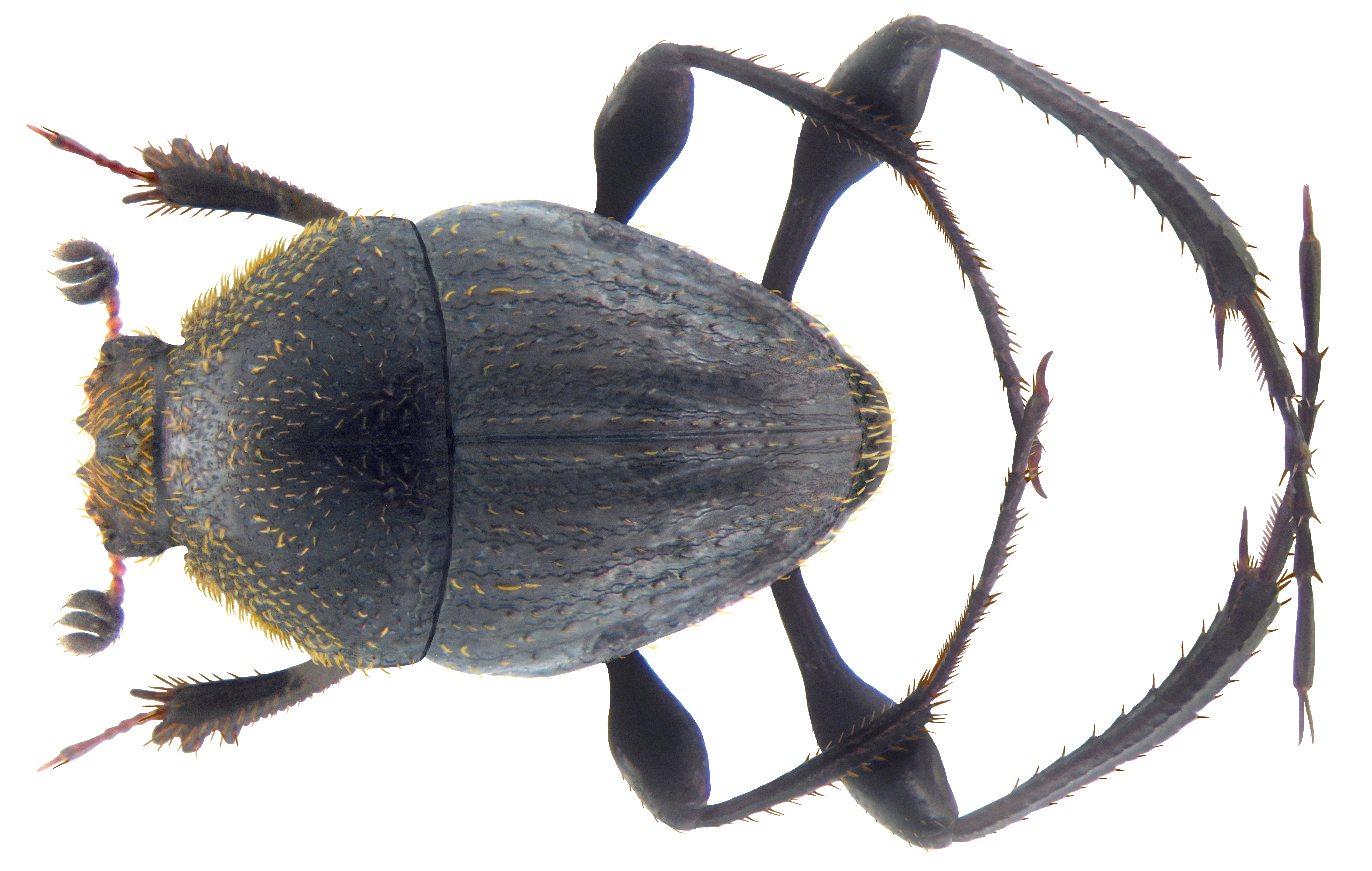 Familie: Scarabaeidae Groesse: 4,7 mm Fundort: Indien, Rajasthan, Agra, Bharatpur leg. Roppel, 2007; det. J.Schönfeld, 2009 Photo: U.Schmidt, 2010